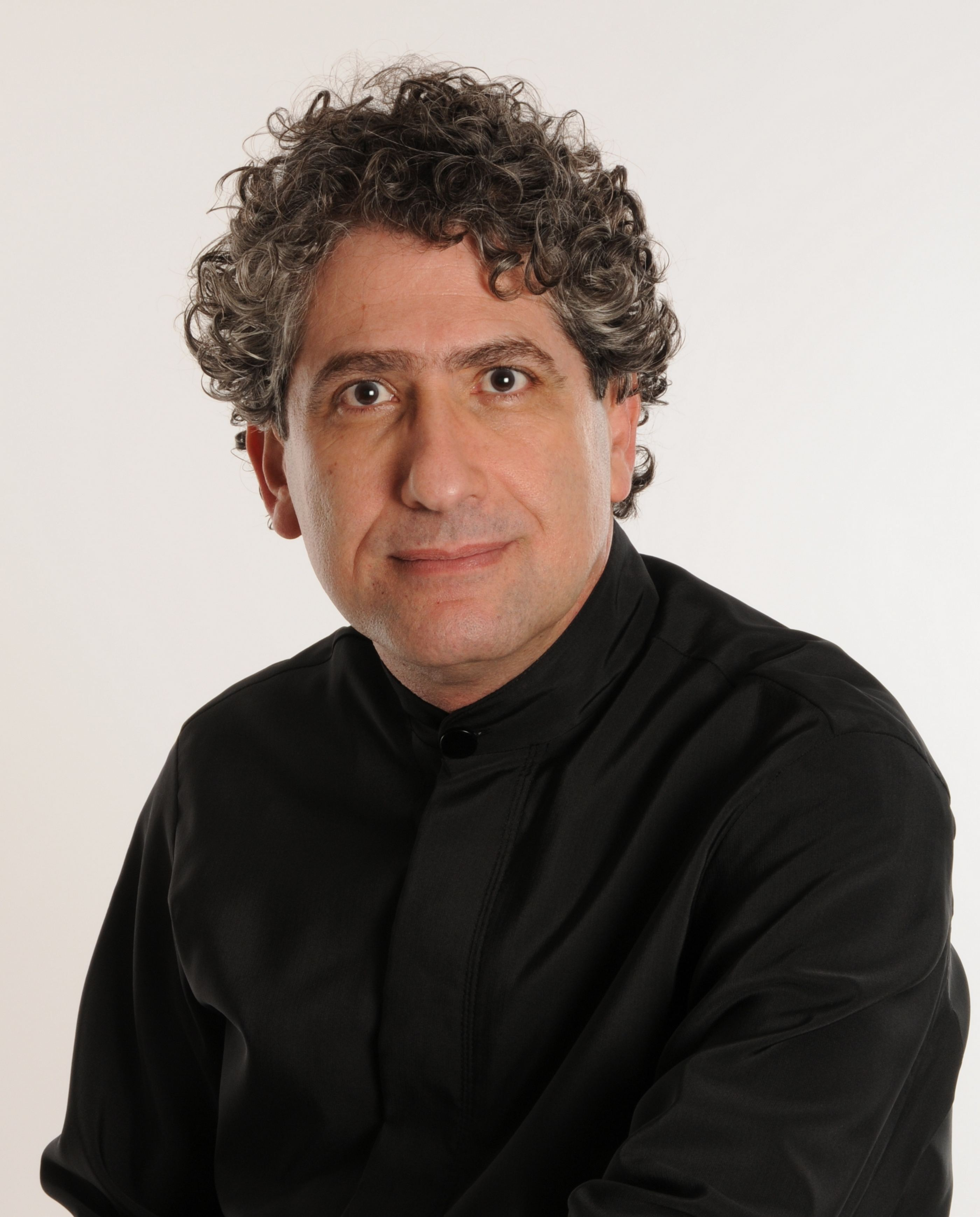 O maestro brasileiro Gil Jardim